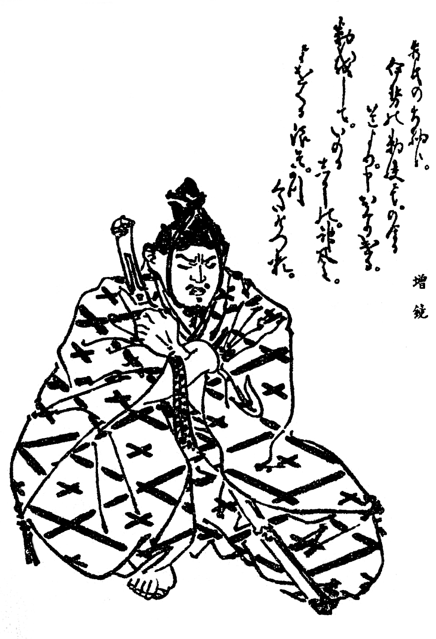 北条時宗。鎌倉時代中期の武将。鎌倉幕府8代執権。／江戸時代『前賢故実』より。画：菊池容斎